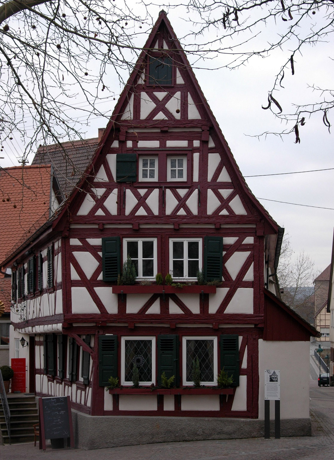 denkmalgeschütztes Weinstube Sonne in Lauffen am Neckar.